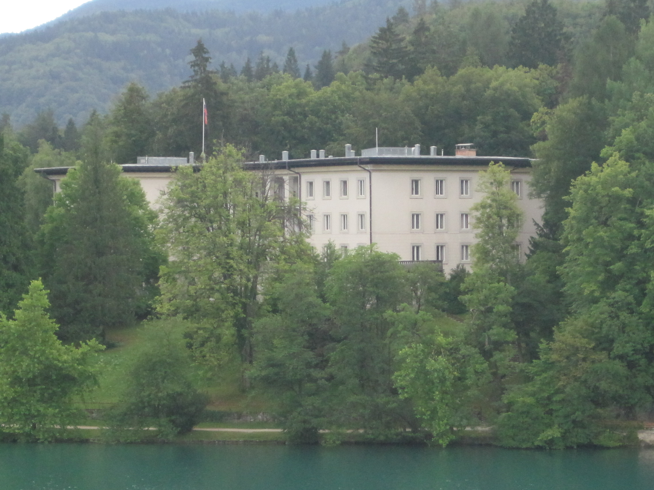 Titos Residenz am Bledsee